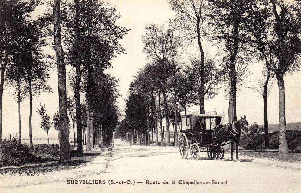 L'actuelle route départementale D 317 entre le carrefour de Survilliers (95) et La Chapelle-en-Serval (60) avec un omnibus à cheval, qui établissait la correspondance avec la gare de Survilliers.